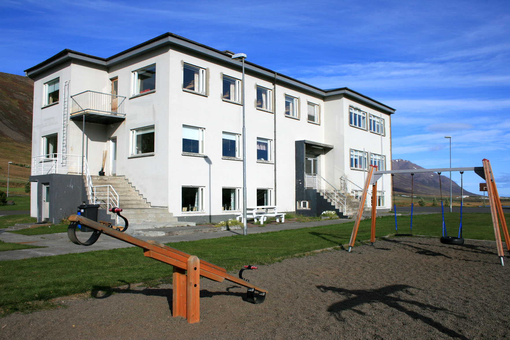 Húsabakki í Svarfaðardal, aðalbygging